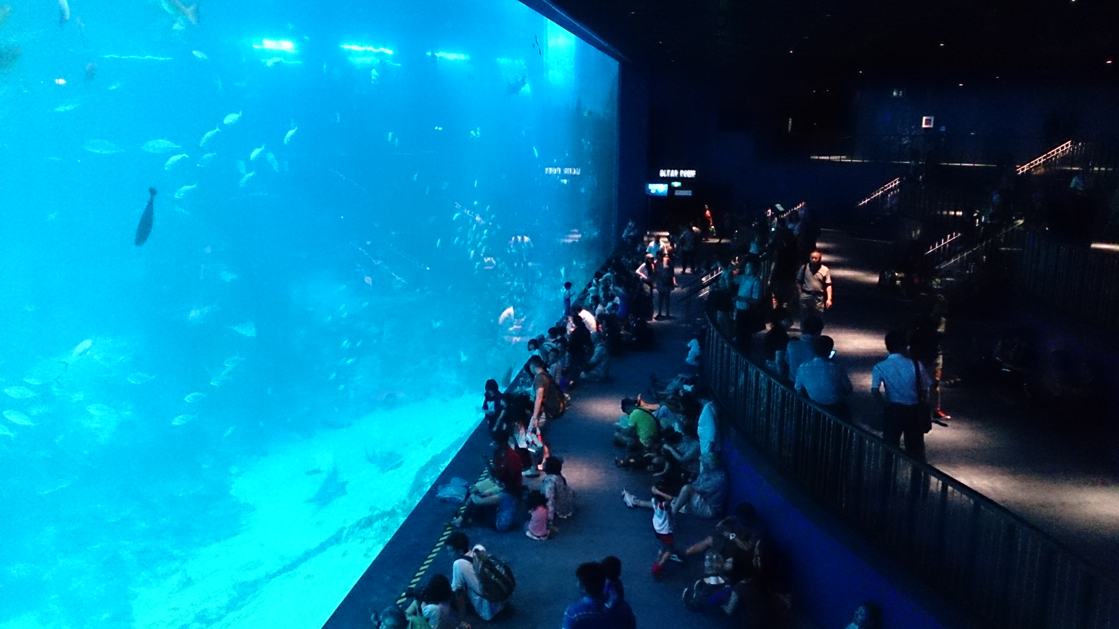 SEA aquarium at RWS Singapore